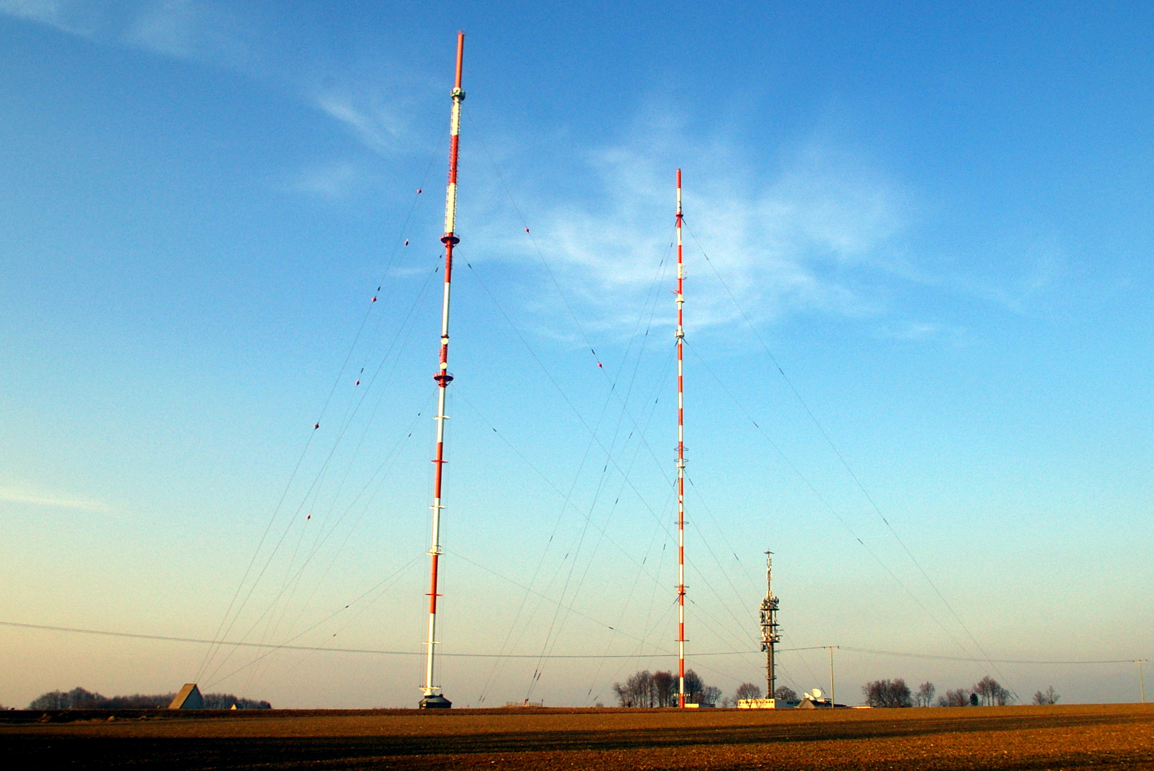 Sendeanlage Dillberg, Blickrichtung Norden